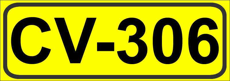 Inidcador de la Carretera de la Comunidad Valenciana CV-306